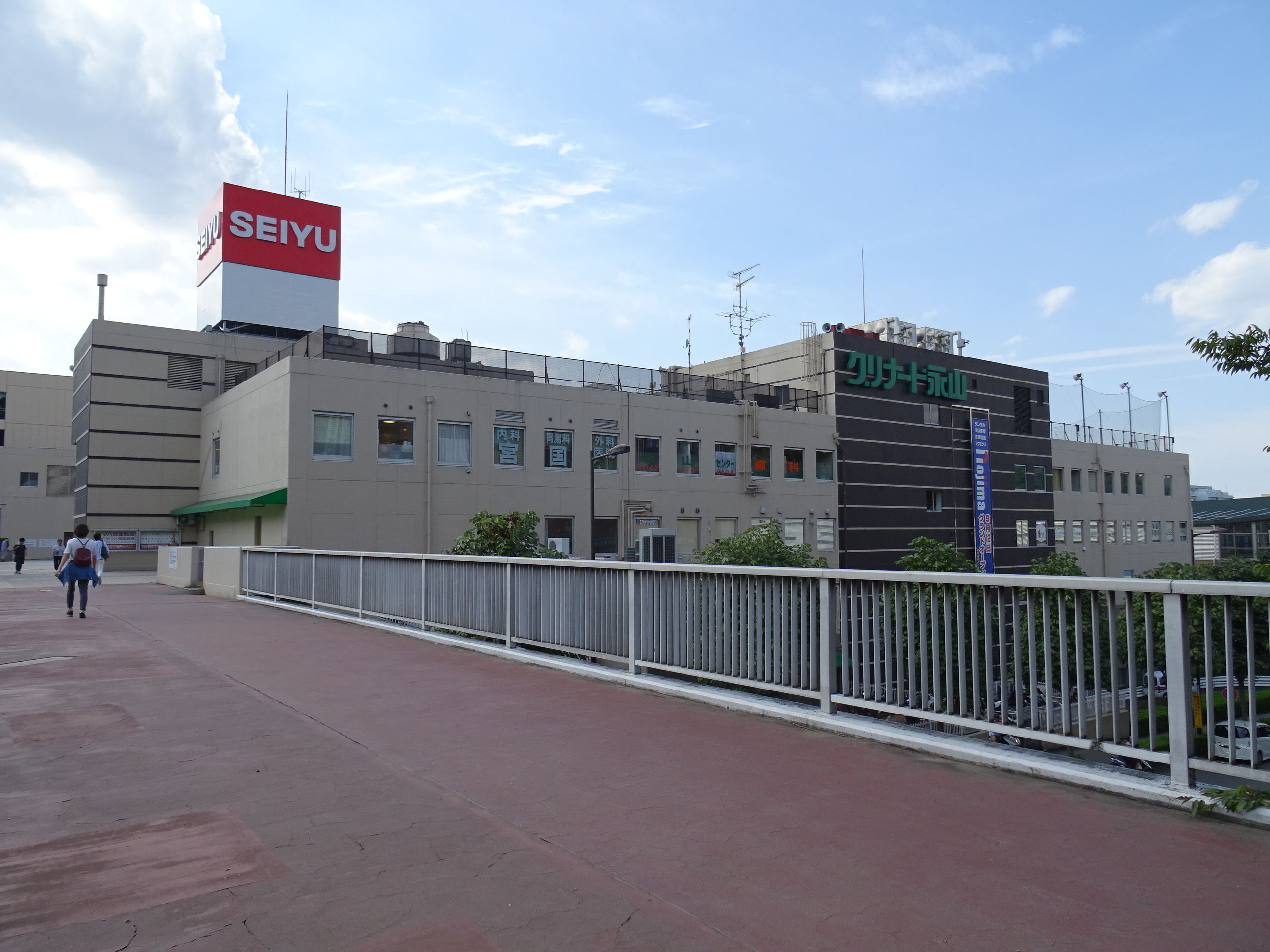 多摩市の永山駅前にある大型商業施設「グリナード永山」（2015/10/04撮影）